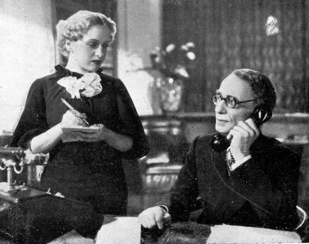 Anonima roylott - foto di scena con Isa Pola e Giulio Donadio -regia Raffaello Matarazzo - prod Fiorda 1936 Roma